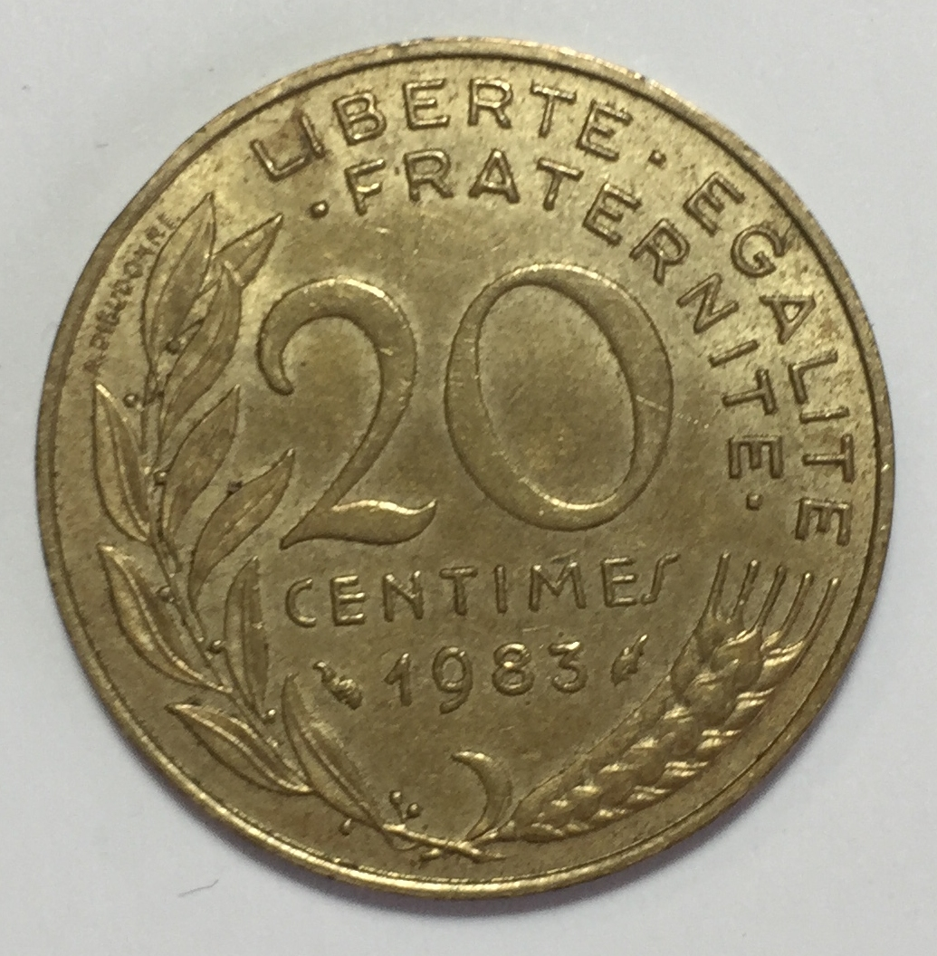 Muenze 20 Centimes (Frankreich 1983)